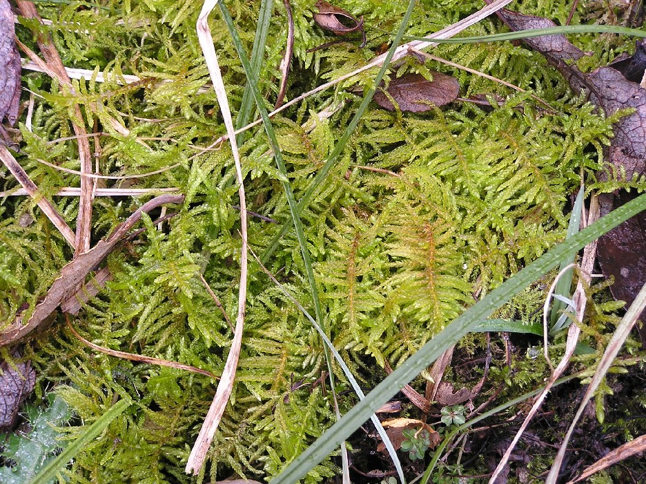 Scleropodium purum, aufgenommen im Hunsrück.